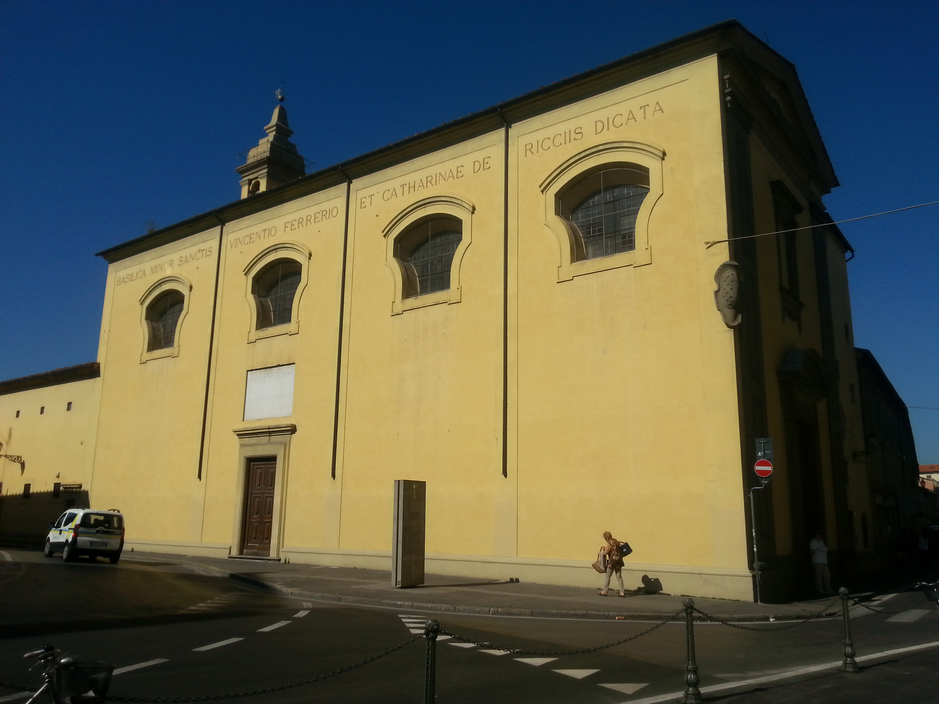 Prato, Piazza San Domenico - Basilica dei SS.Vincenzo e Caterina de Ricci This is a photo of a monument which is part of cultural heritage of Italy.